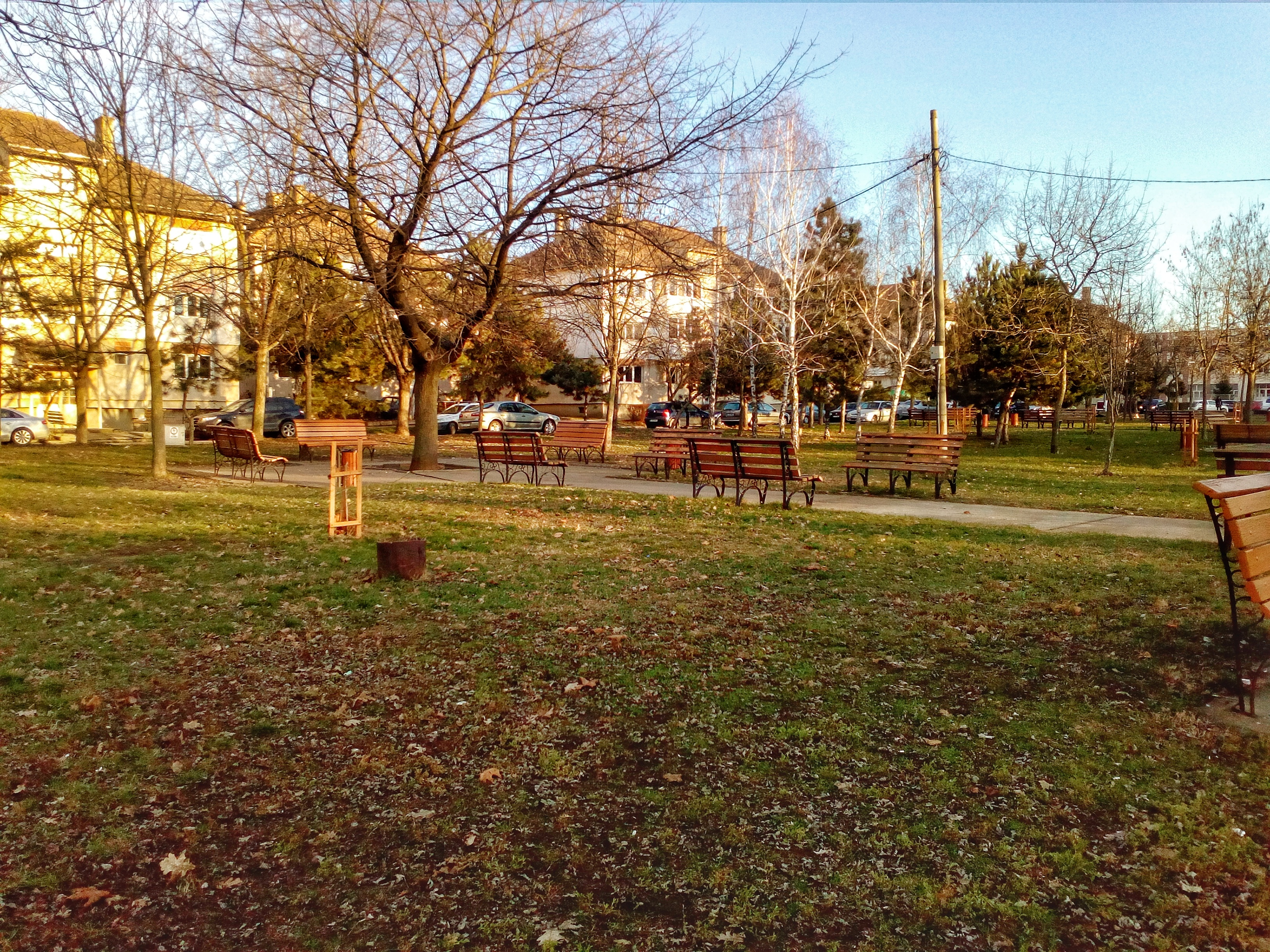 Parc Central Fetesti, Judetul Ialomita, Romania